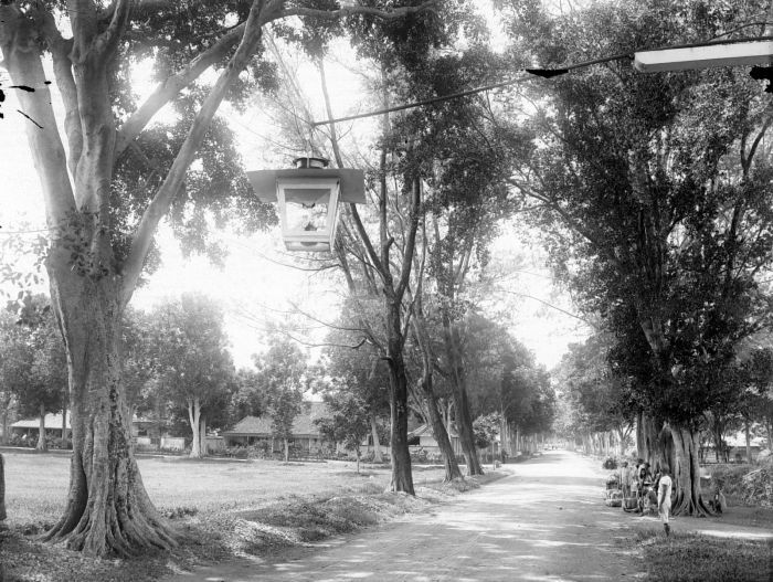 Negatief. Een straatbeeld van een landweg naar Banjoebiroe in Ambarawa te Semarang. Langs de weg staan een aantal lokale bewoners van het dorp. De weg naar Banjoebiroe in Ambarawa